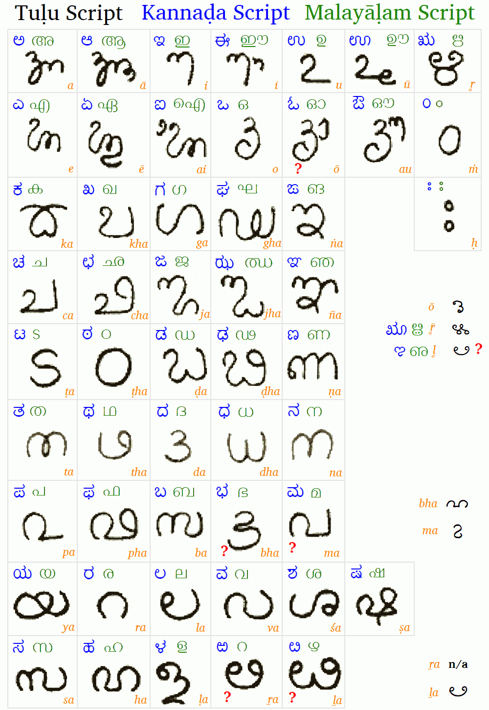 Tulu-Kannada-Malayalam Alphabet Table